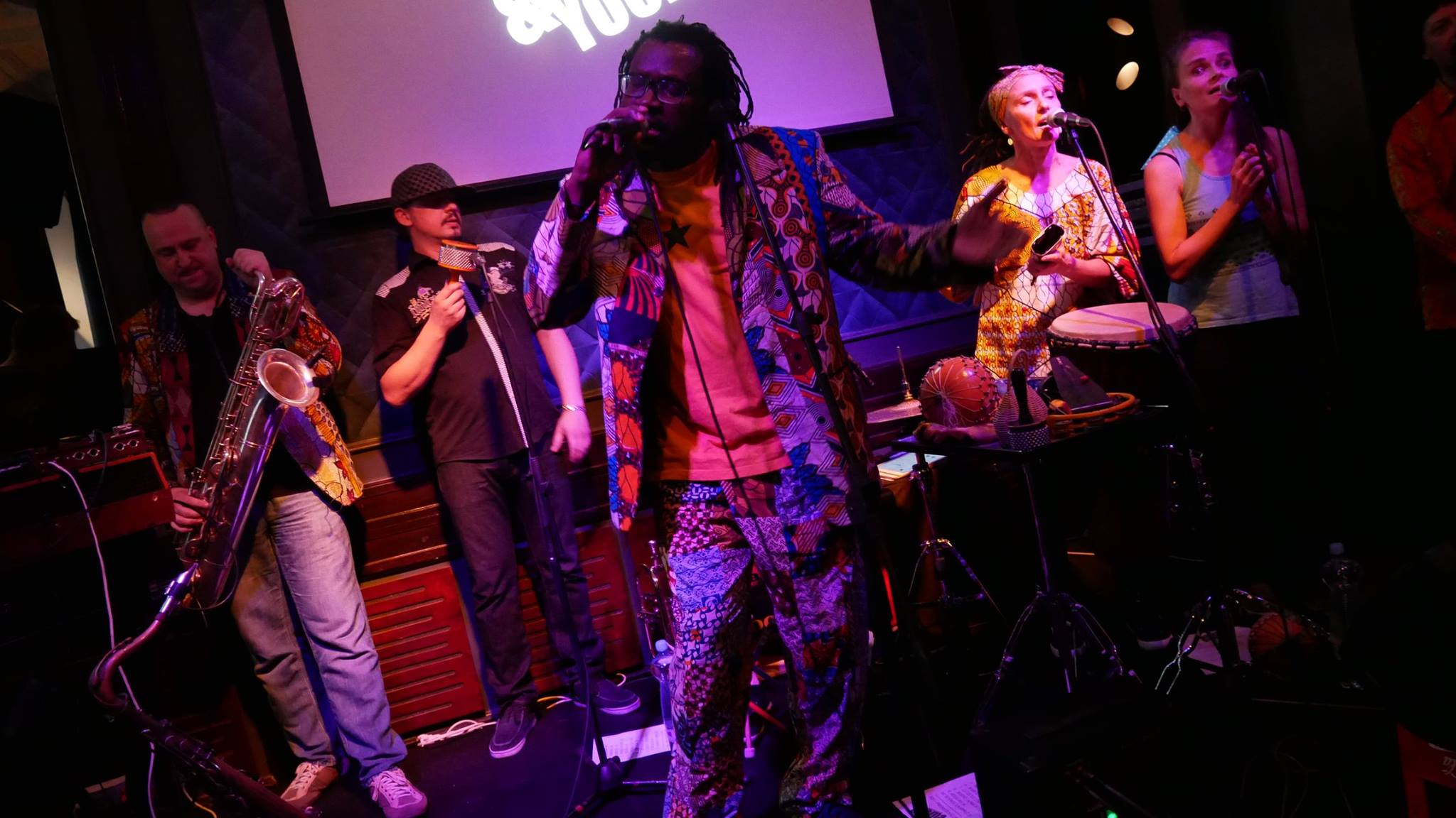 koncert zespołu "Mamadou & Sama Yoon" w klubie Spatif w Warszawie